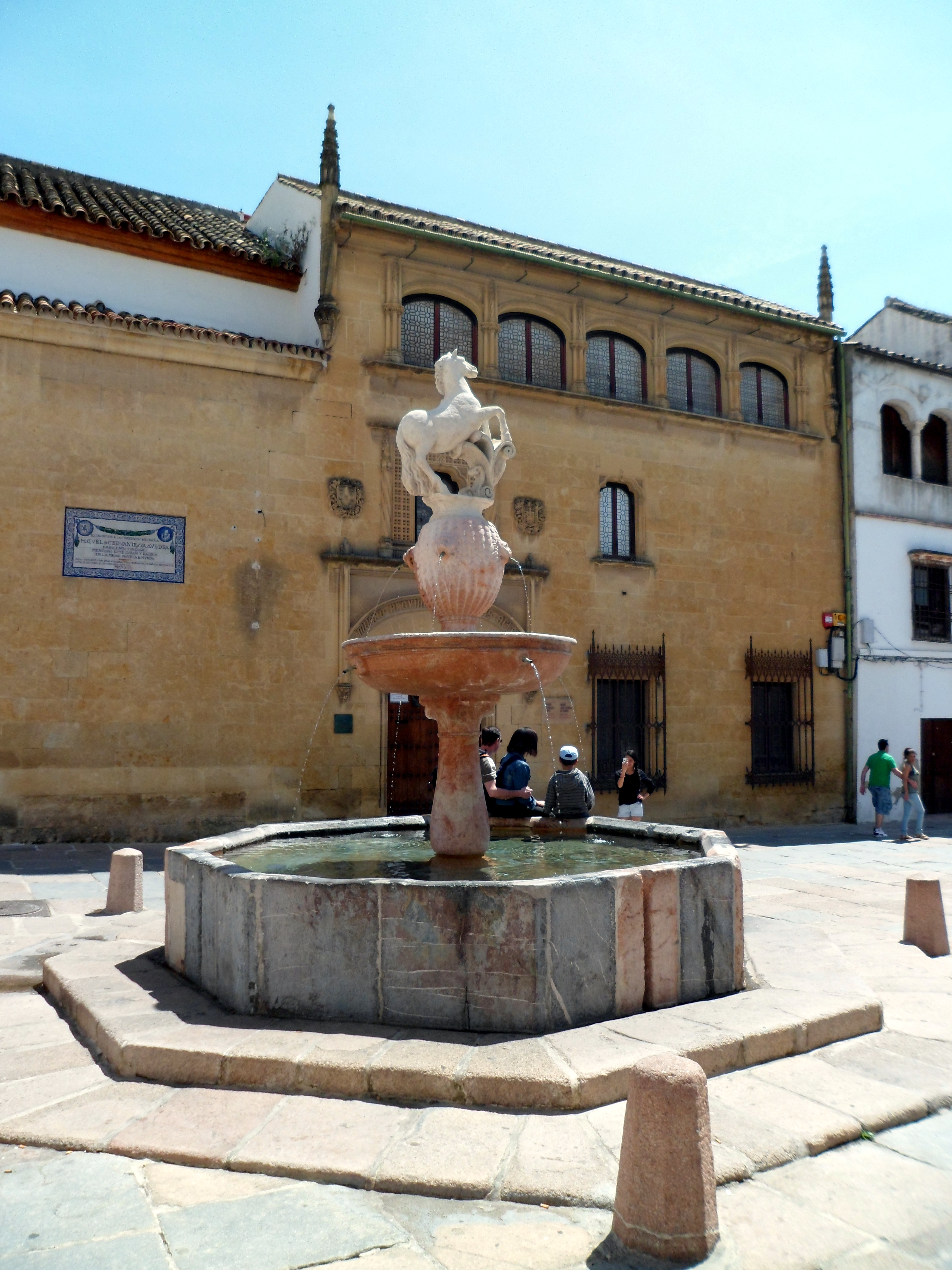 Fuente del Potro en la plaza del Potro, Córdoba (España).